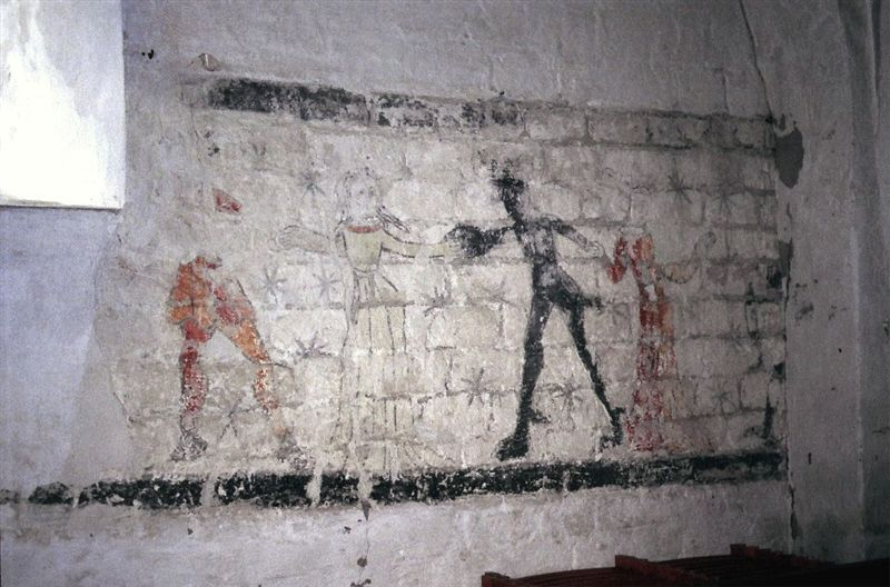 Jungshoved Kirke i Danmark. Skibets vestvæg, Dødedans